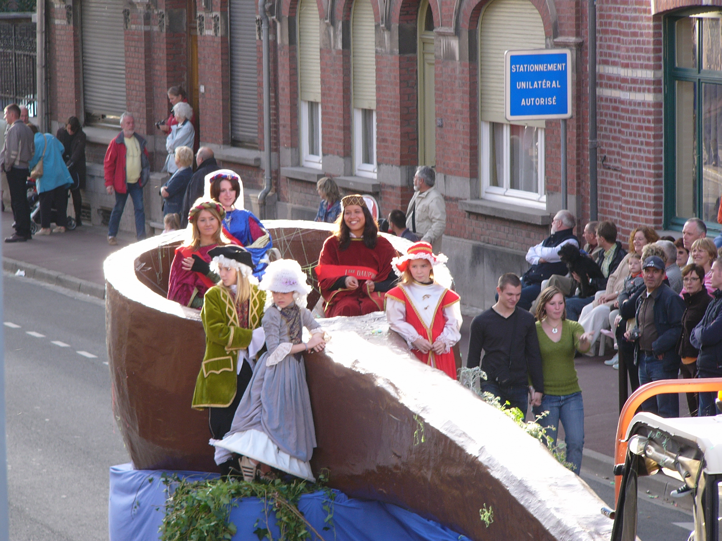 la damoiselle des louches sur son char pendant le défilé d'octobre 2006